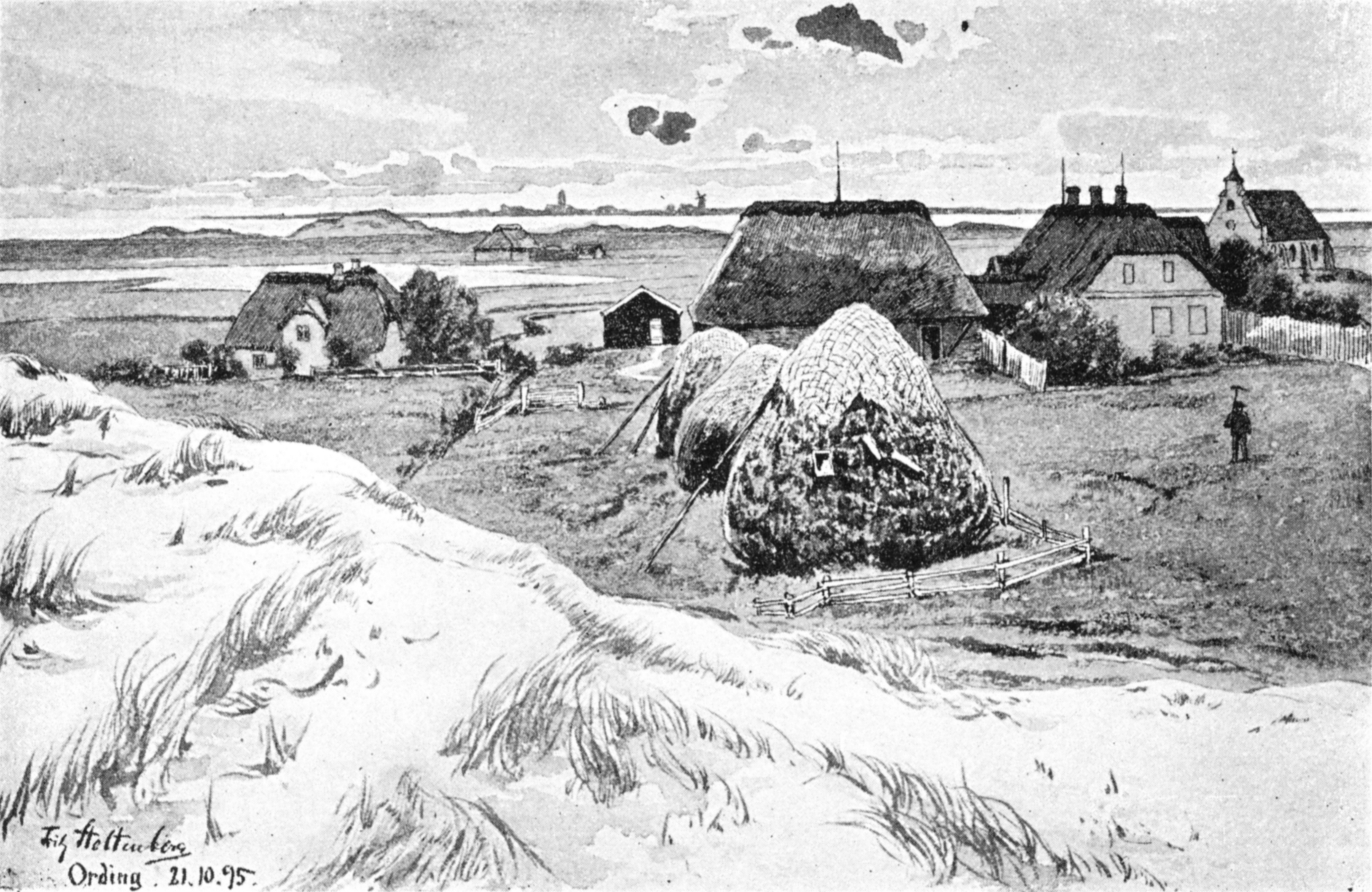 Ording mit Blick auf Westerhever